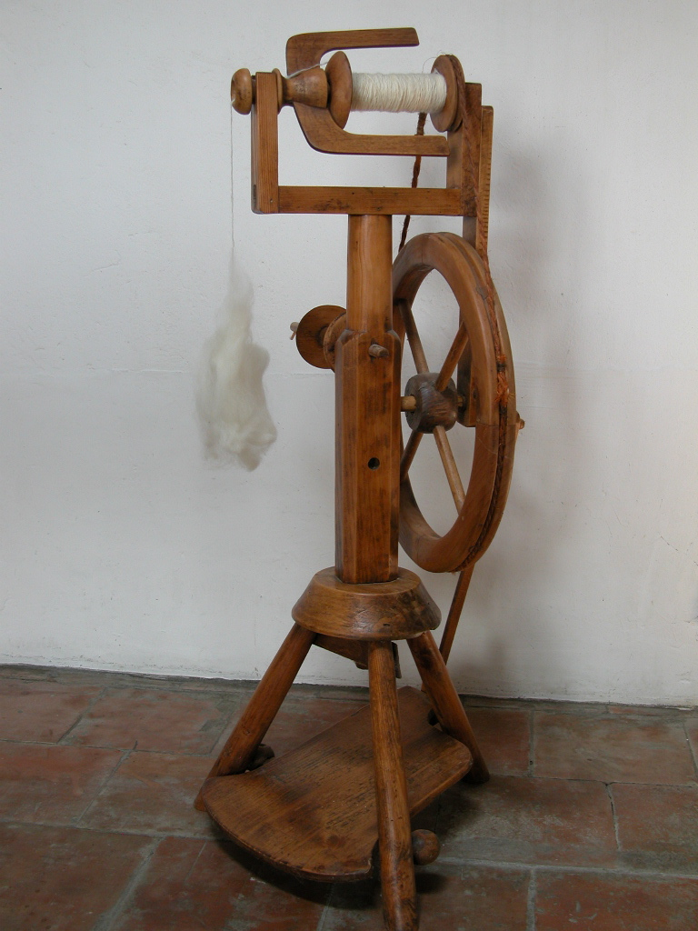 foto mia personale, giugno 2007 Licensing Categoria:Immagini sulla tessitura